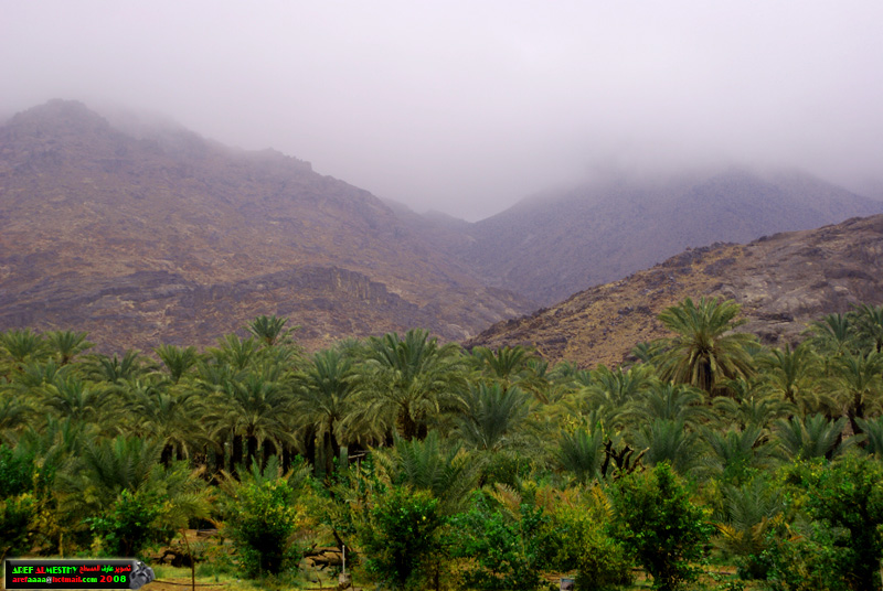 من عقدة اللي ما يزحزح قناها